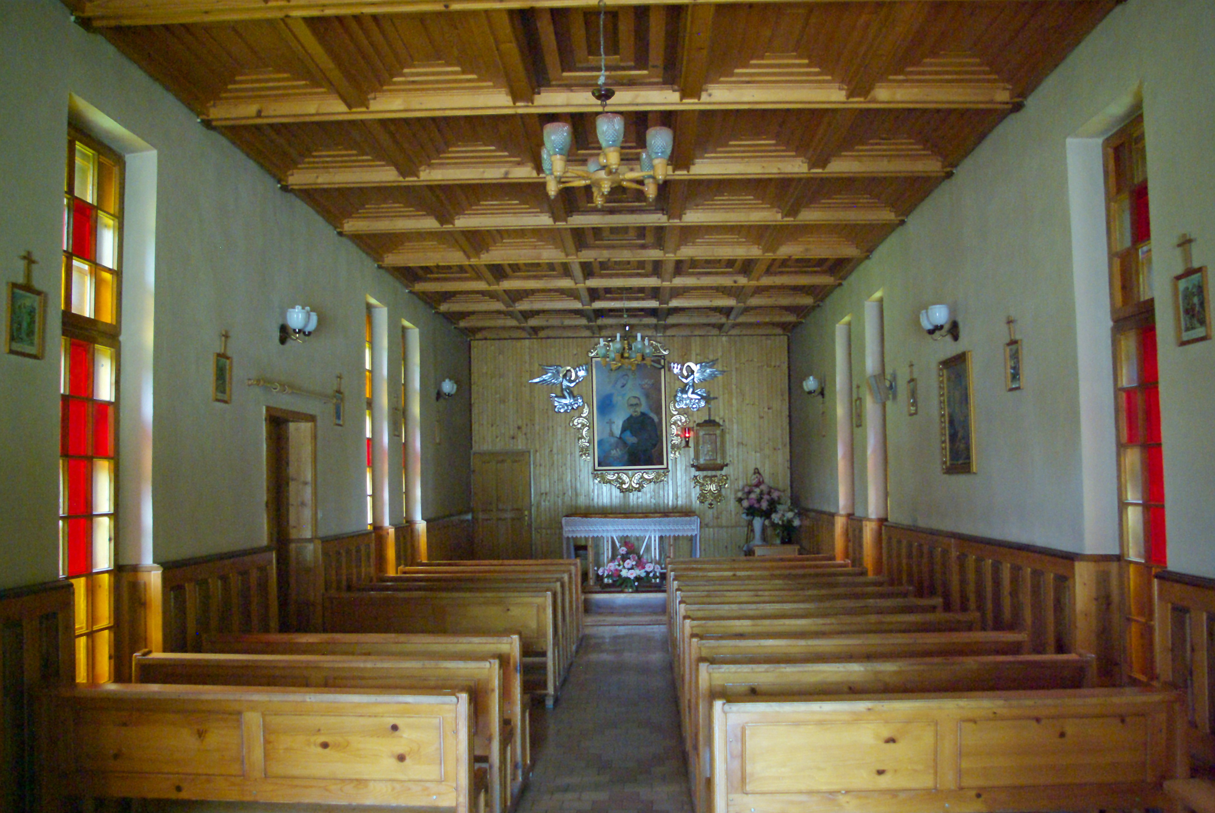 Kaplica rektoralna pw. Św. Maksymiliana Kolbego w Sanoku (filia Parafii Przemienienia Pańskiego w Sanoku)